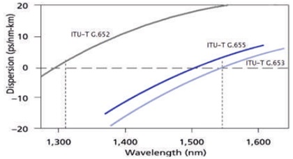 profil spektralny dyspersji chromatycznej